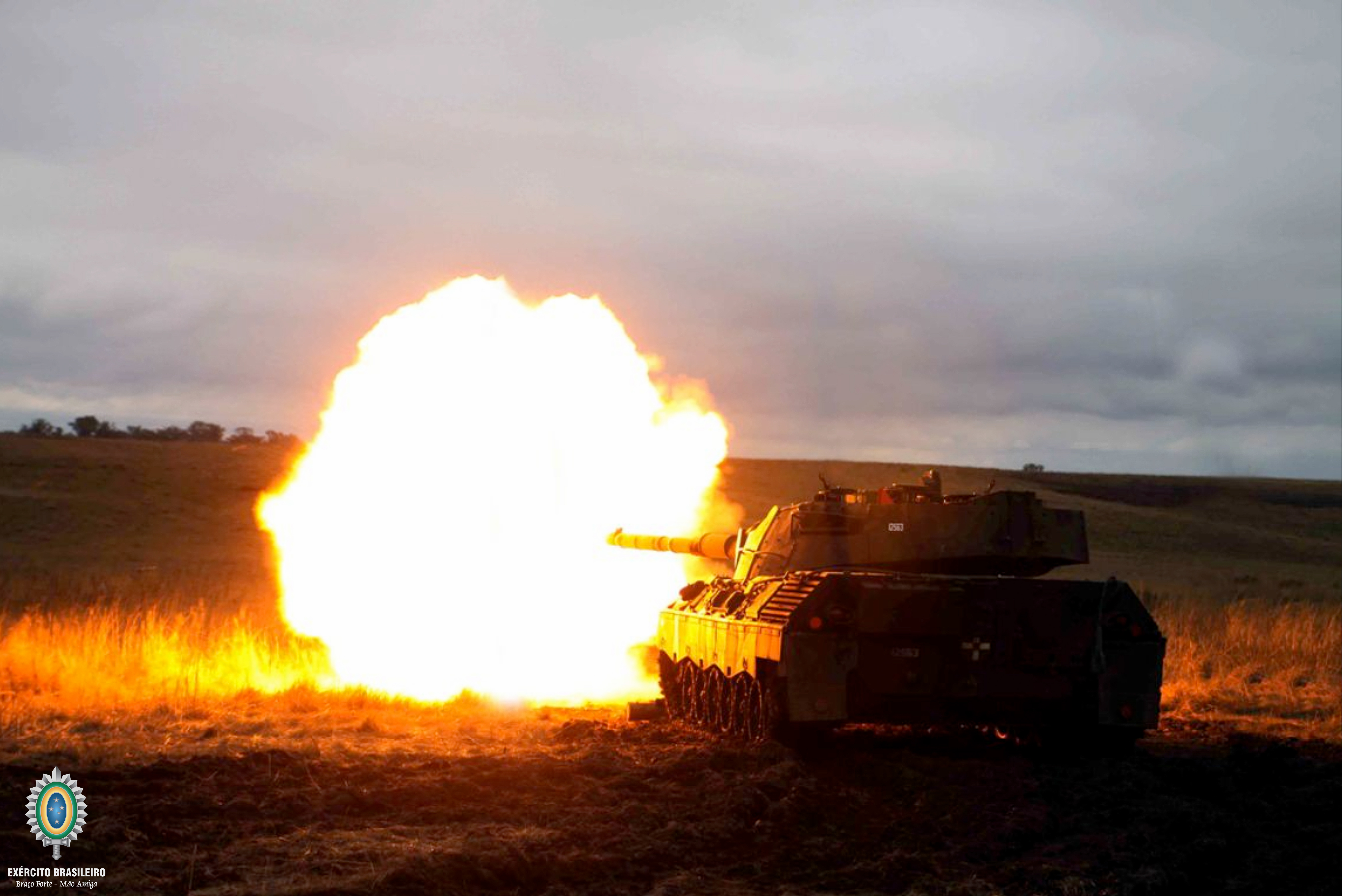 Cavalaria